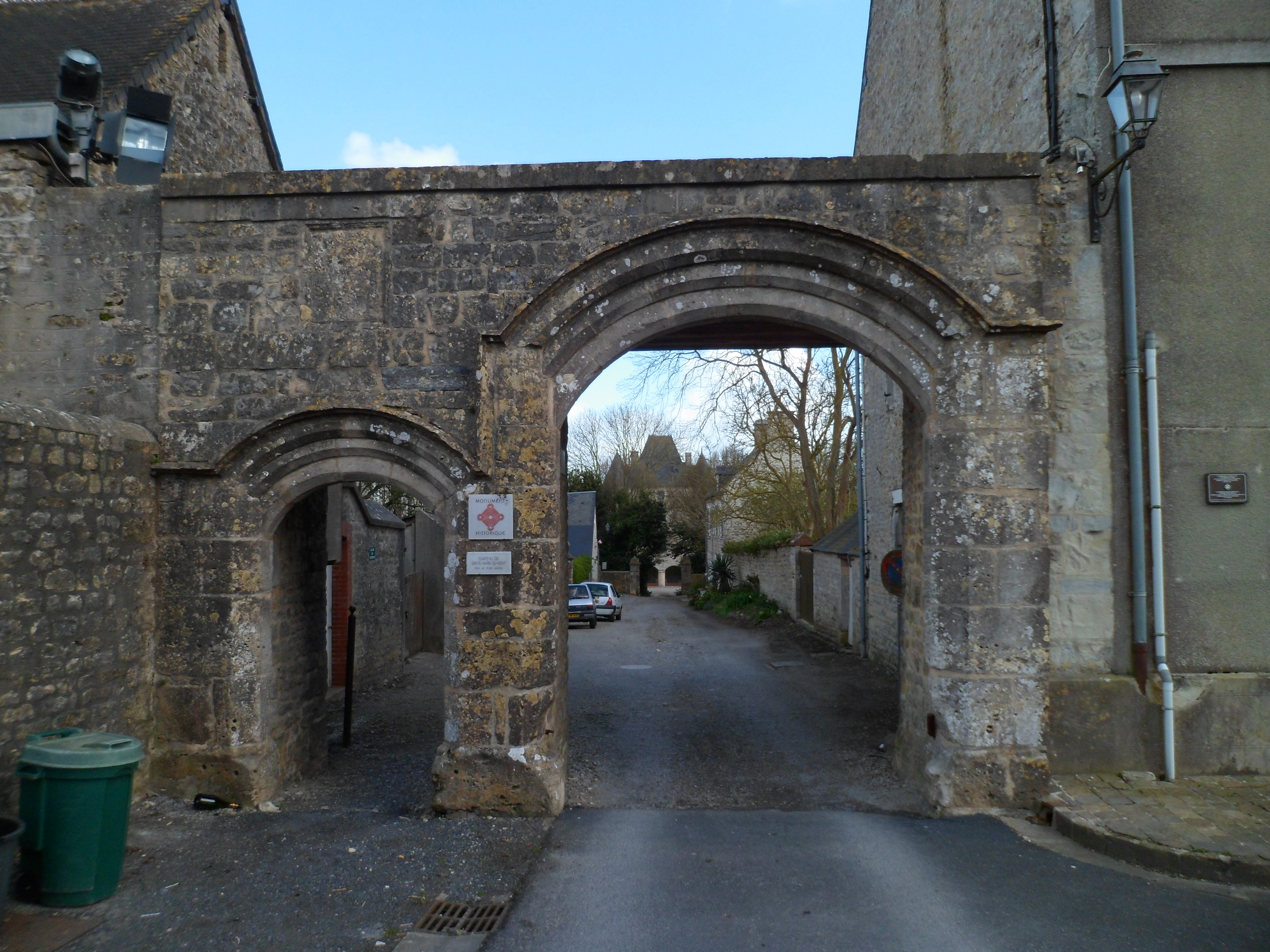 Ancien château de Sainte-Marie-du-Mont .